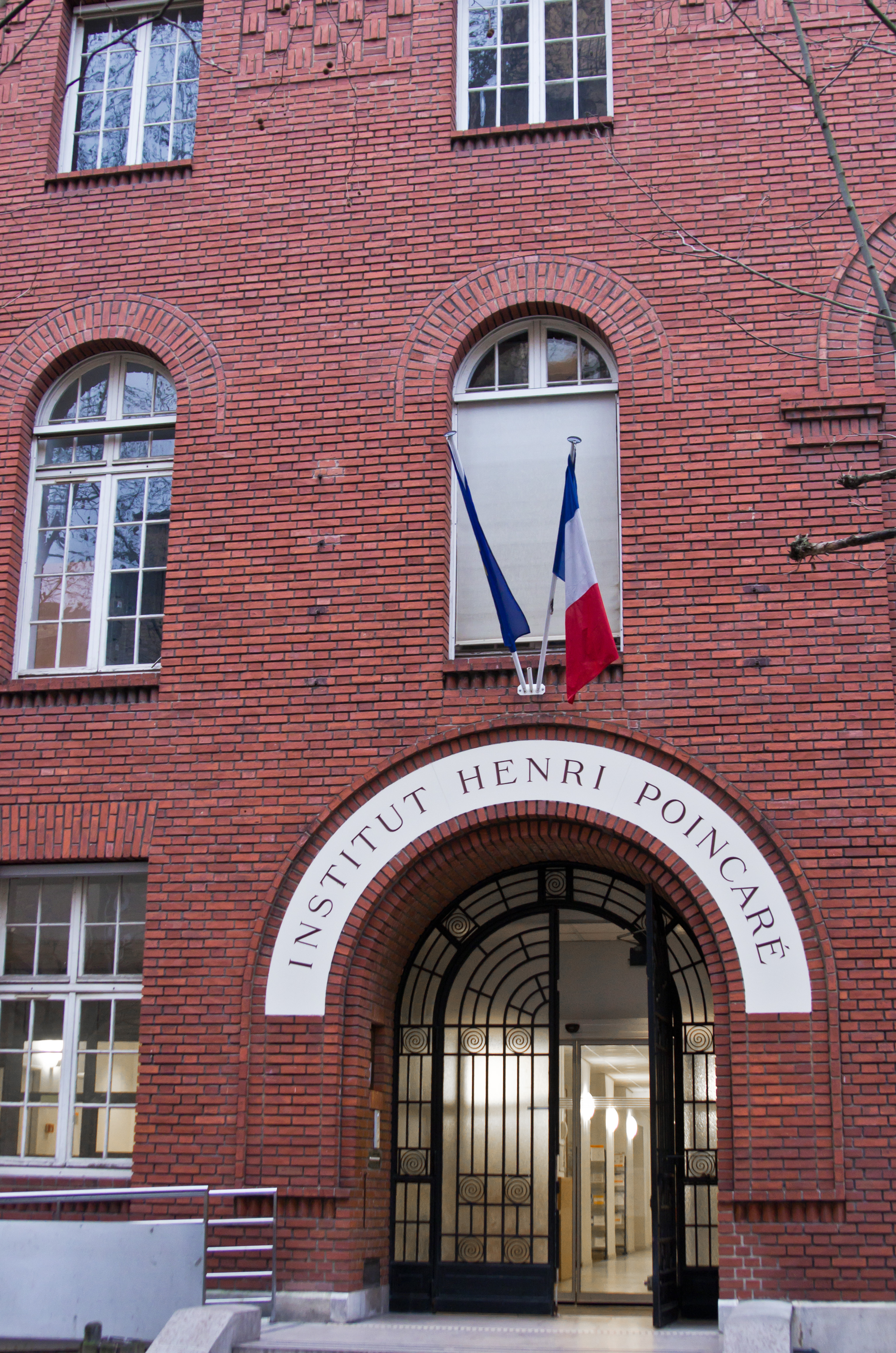 Entrée principale de l'Institut Henri-Poincaré